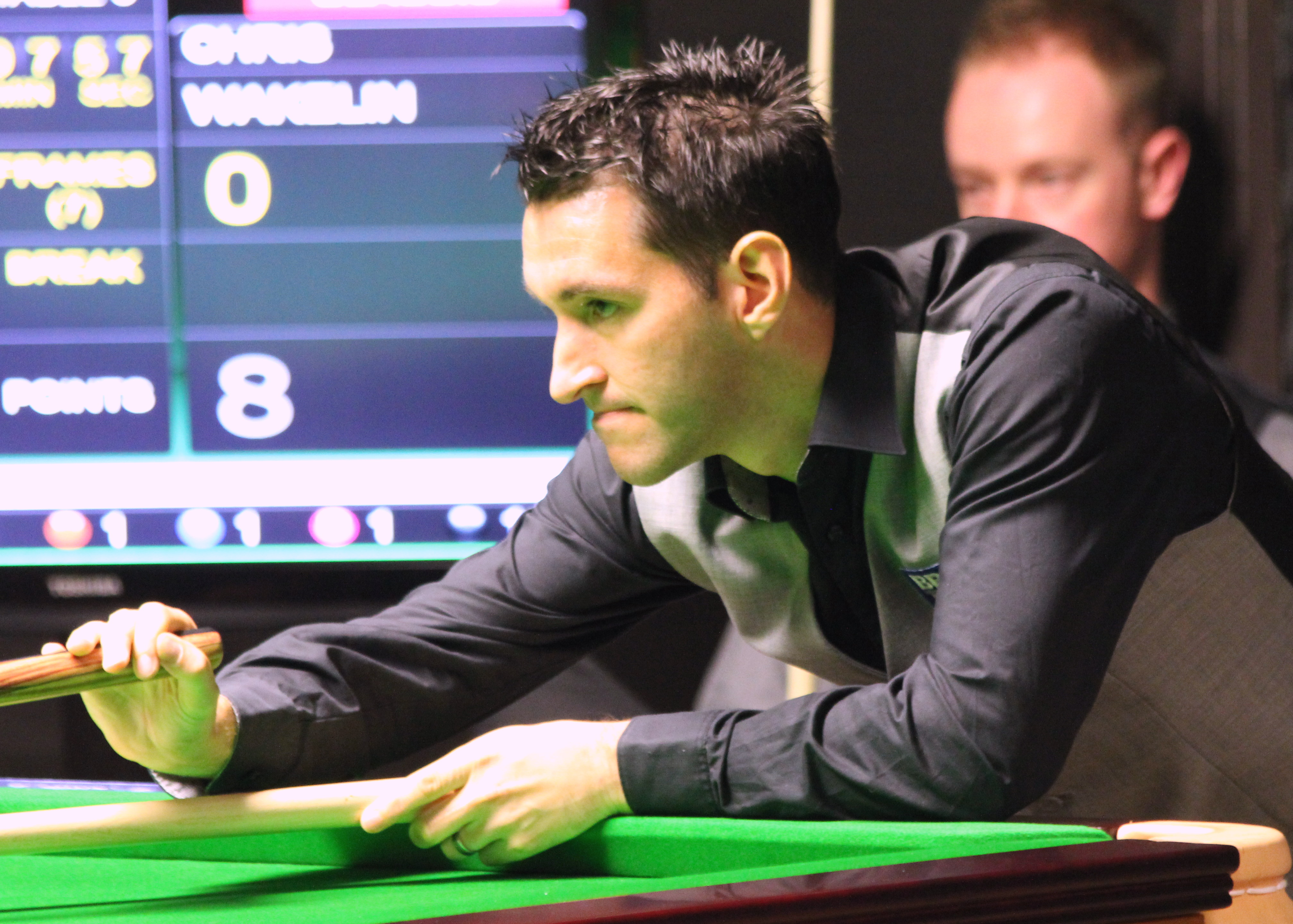 Tom Ford beim Paul Hunter Classic 2016